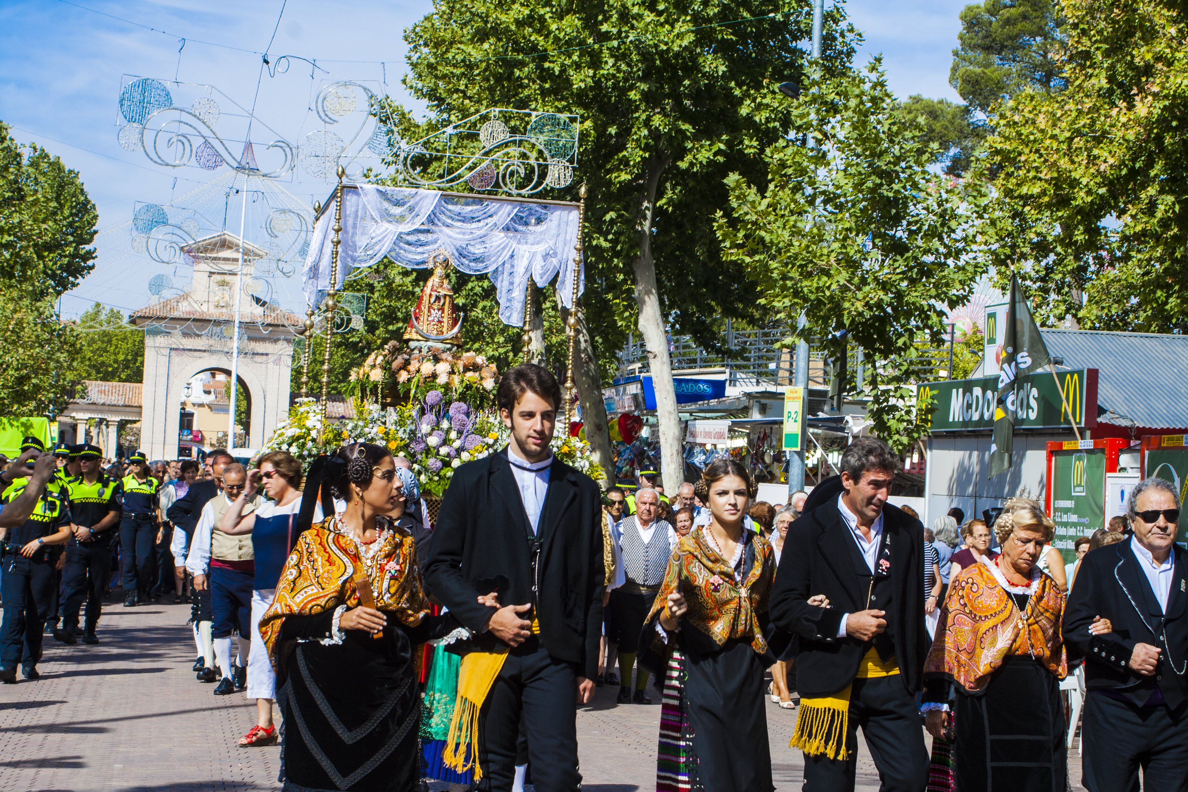 Traslado de la Virgen de los Llanos a la Catedral de Albacete tras terminar la Feria de Albacete